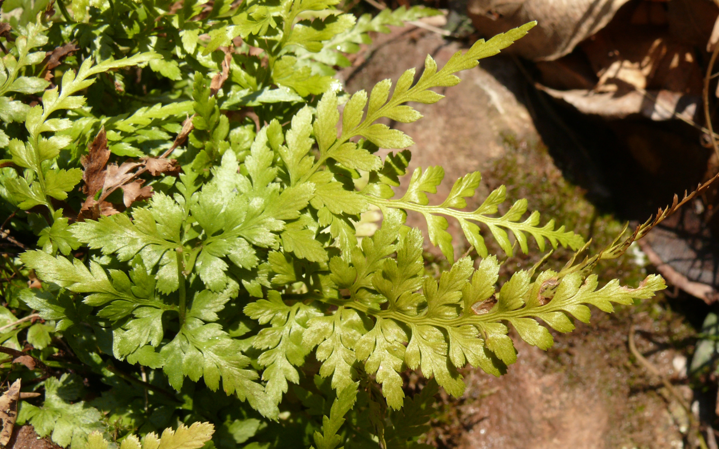 Asplenium adiantum-nigrum, Spessart, Germany